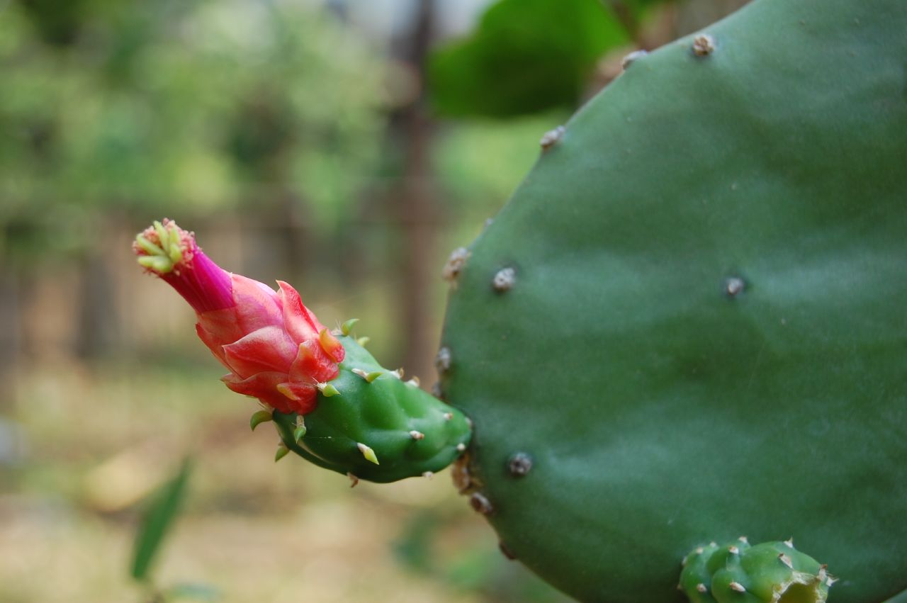 Opuntia (Nopalea) cochenillifera